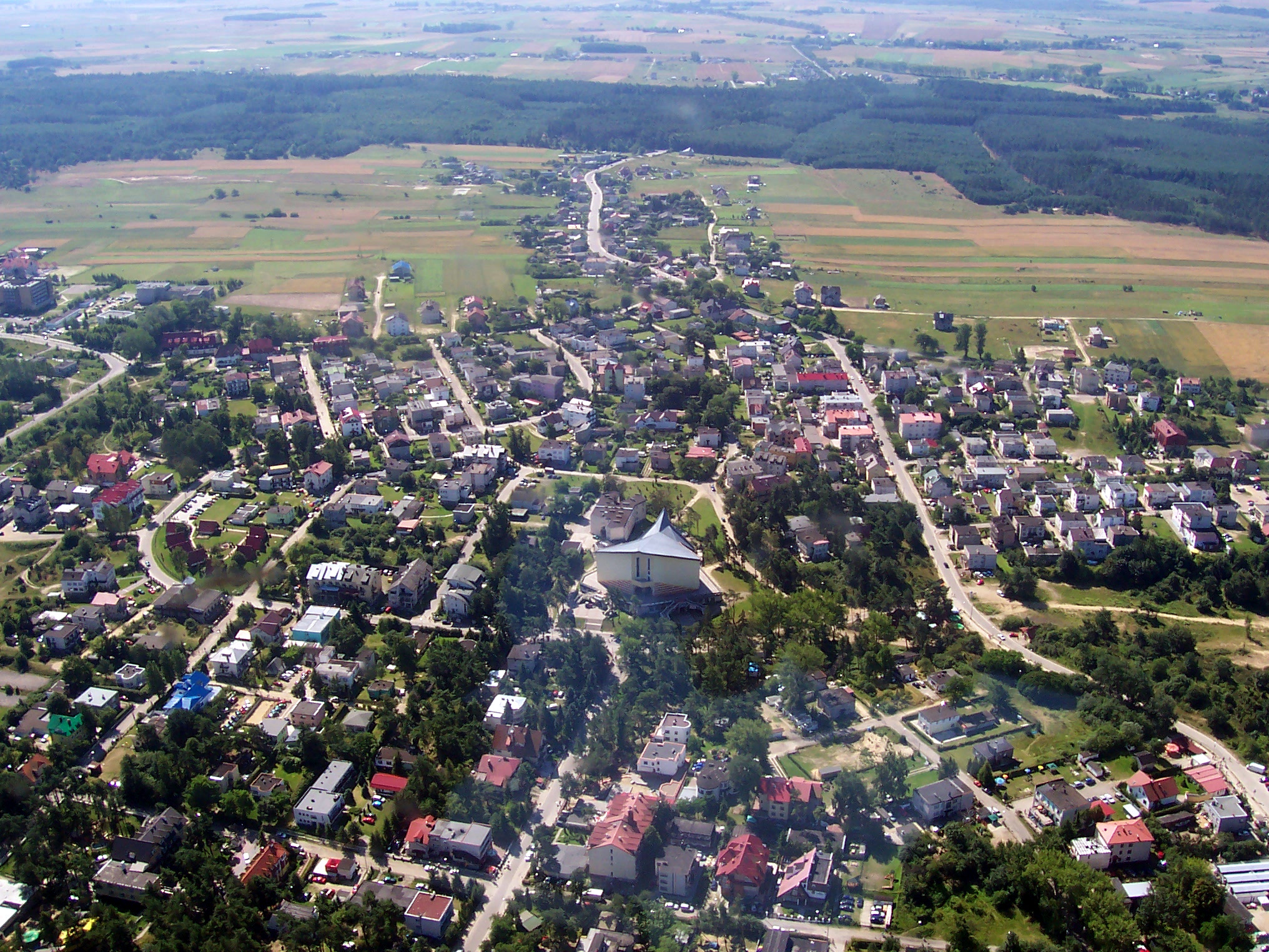 Jastrzębia Góra z lotu ptaka